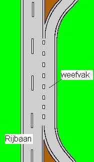 Zelf gemaakte tekening van weefvak